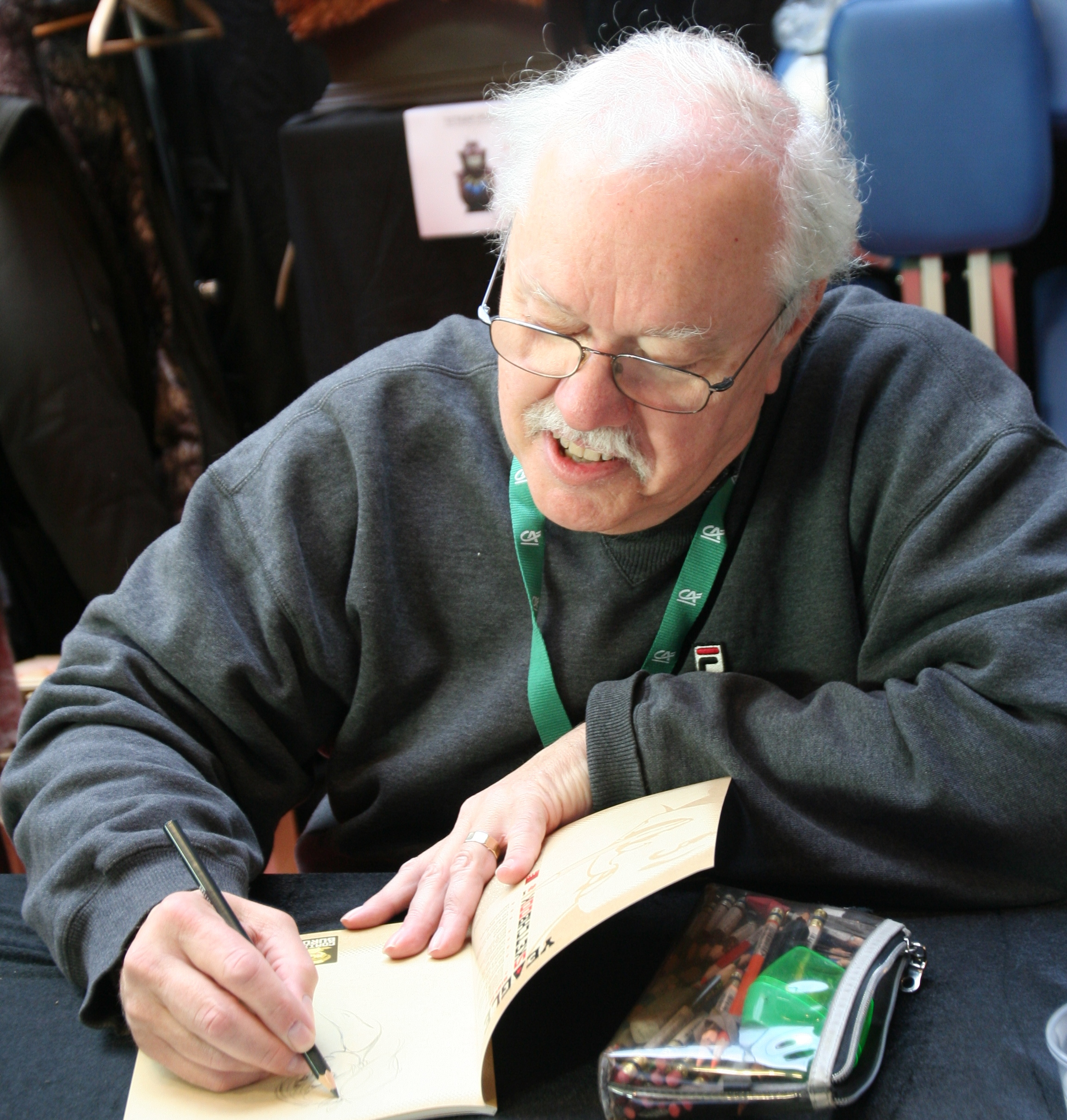 Dean Yeagle lors de Quai des Bulles à Saint-Malo le 27 octobre 2012.